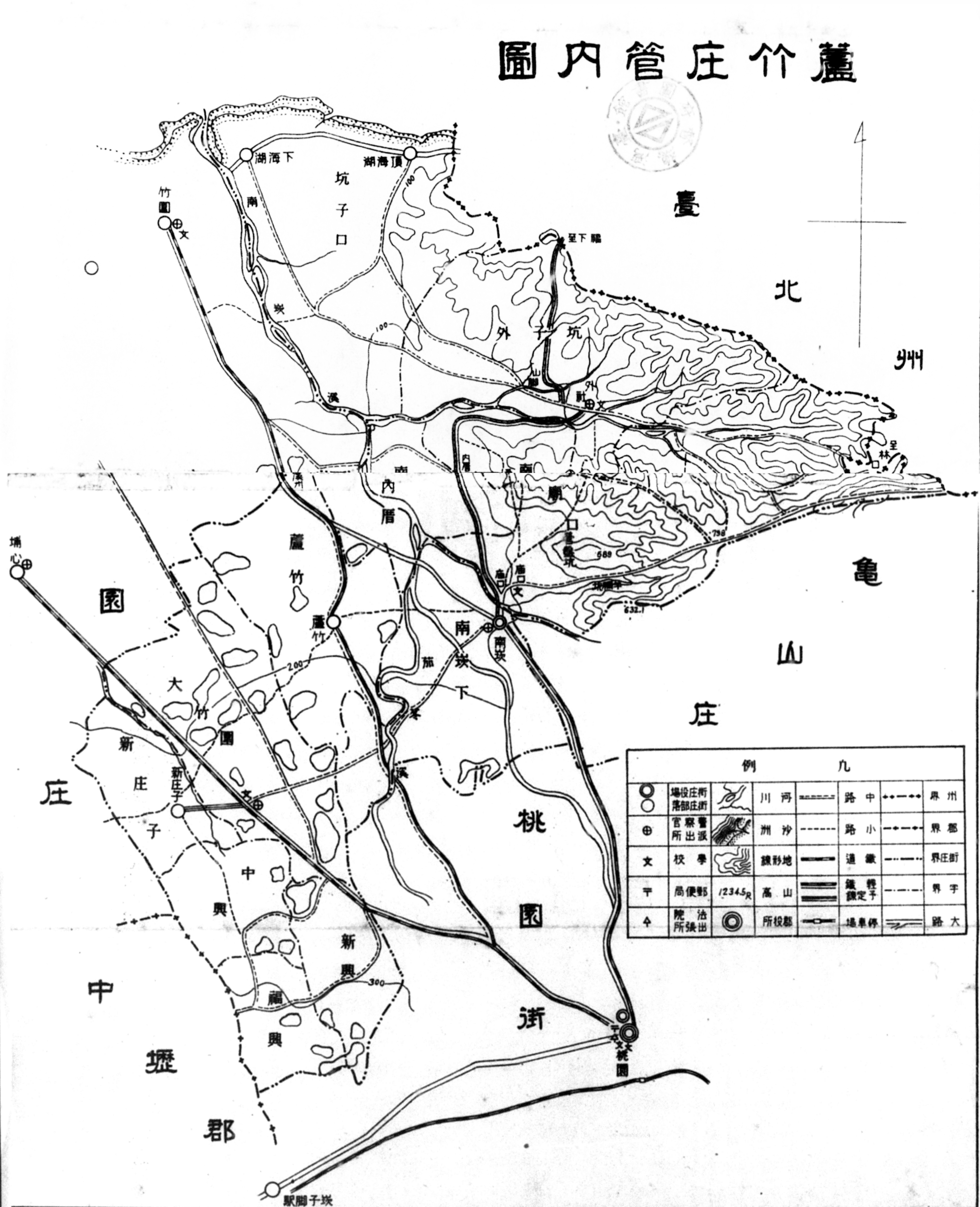 新竹州桃園郡蘆竹庄管內圖